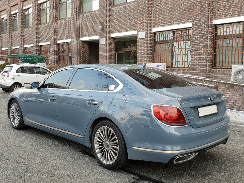 기아 K9 후측면